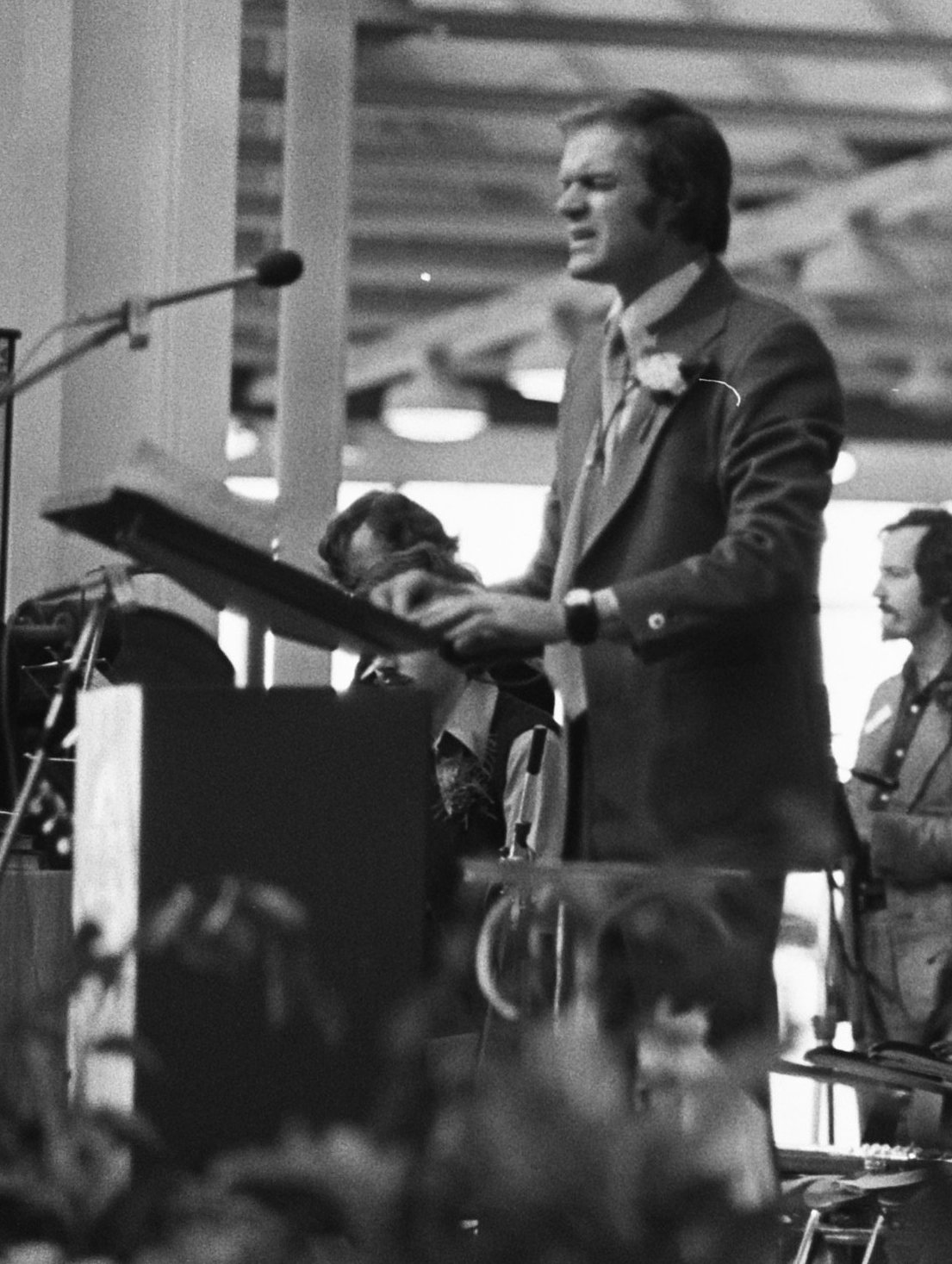 Collectie / Archief : Fotocollectie Anefo Reportage / Serie : [ onbekend ] Beschrijving : Evangelist Ben Hoekendijk houdt "One way day" in Julianahal, Utrecht; Ben Hoekendijk aan het woord Datum : 18 oktober 1975 Locatie : Utrecht Instellingsnaam : Julianahal Fotograaf : Bogaerts, Rob / Anefo Auteursrechthebbende : Nationaal Archief Materiaalsoort : Negatief (zwart/wit) Nummer archiefinventaris : bekijk toegang 2.24.01.05 Bestanddeelnummer : 928-2135